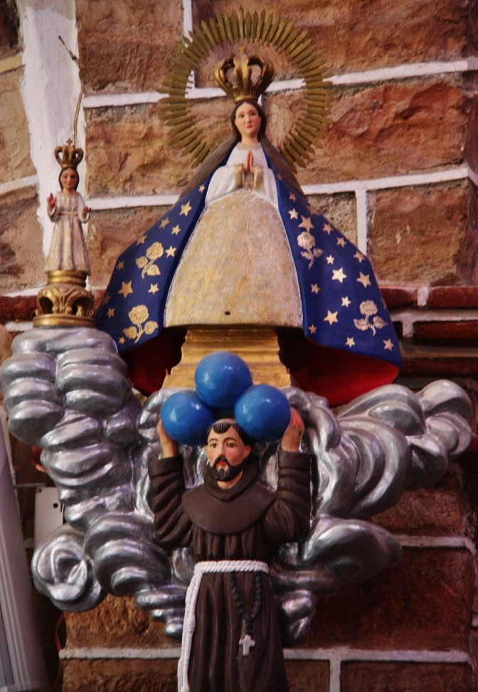 Iglesia San Francisco Galileo, El Pueblito, Corregidora, Estado de Querétaro, México : Virgen del Pueblito